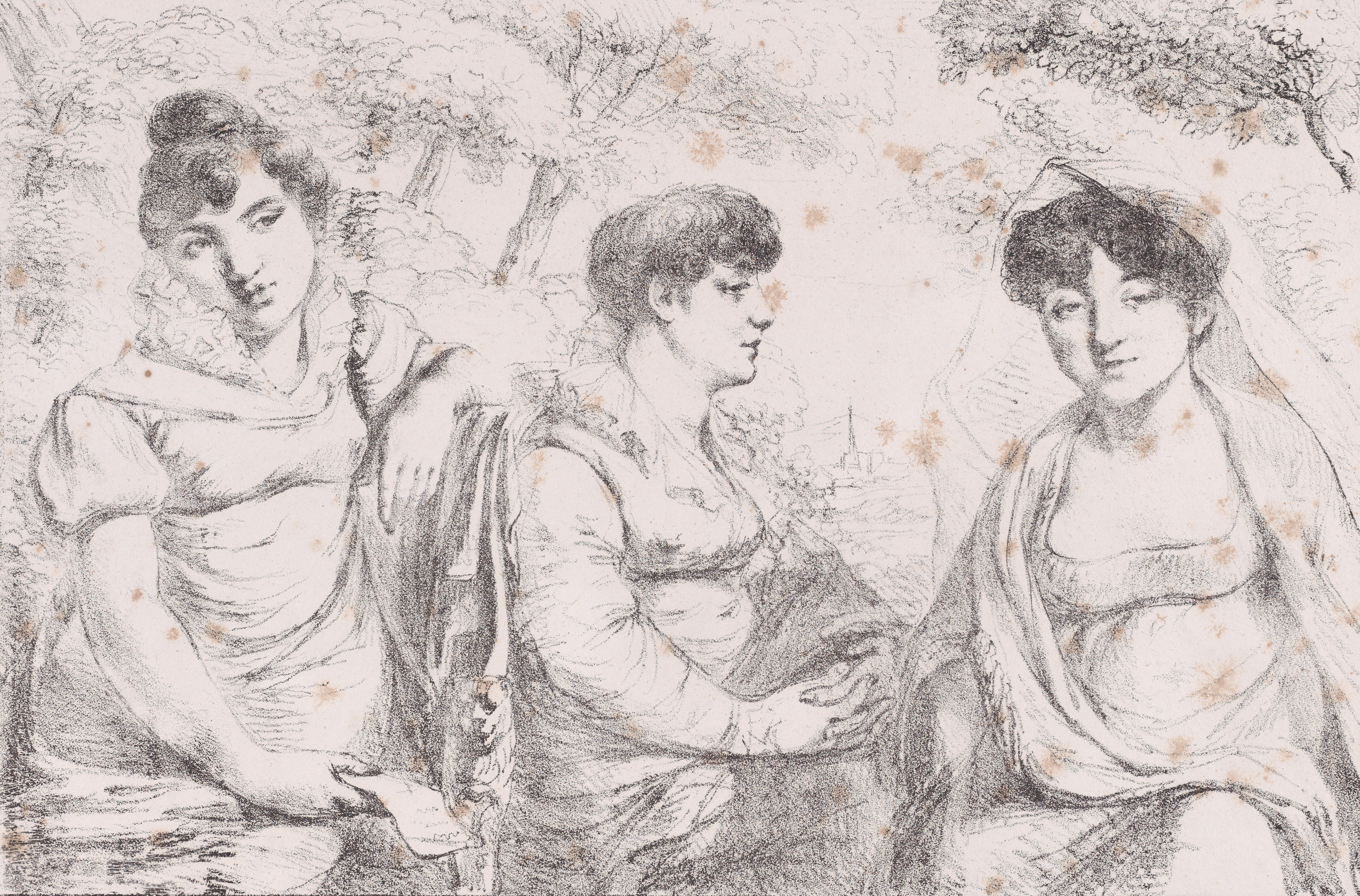 Three sitting women in a landscape. According to Henri Beraldi, Les Graveurs du dix-neuvième siècle : guide de l'amateur d'estampes modernes, vol. V (Paris, Conquet, 1866), p. 185 available online on Gallica, the lithograph Les Délices de la Campagne depicts "Melle Esmenard, lady Morgan et une troisième femme" (i.e. Inès Esménard, Category:Lady Morgan and a third woman.